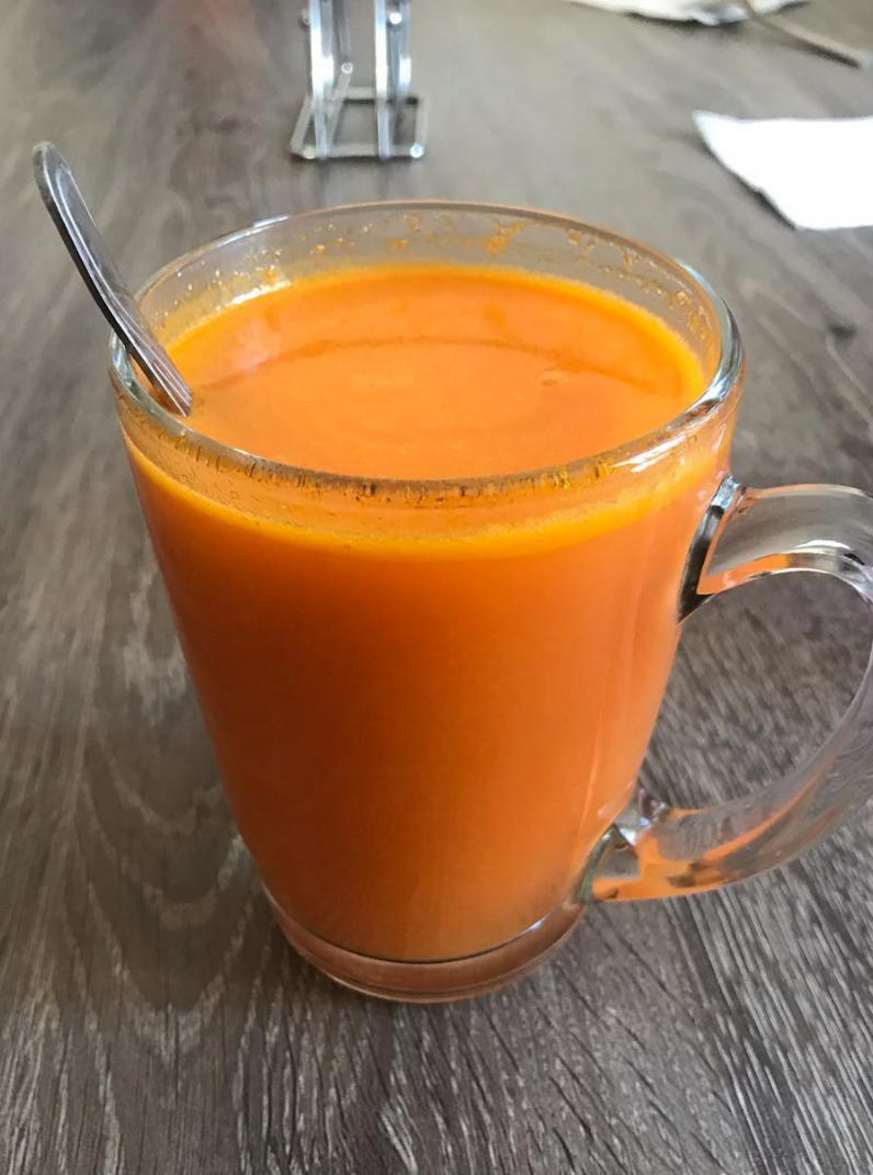 Лечебный морковный сок